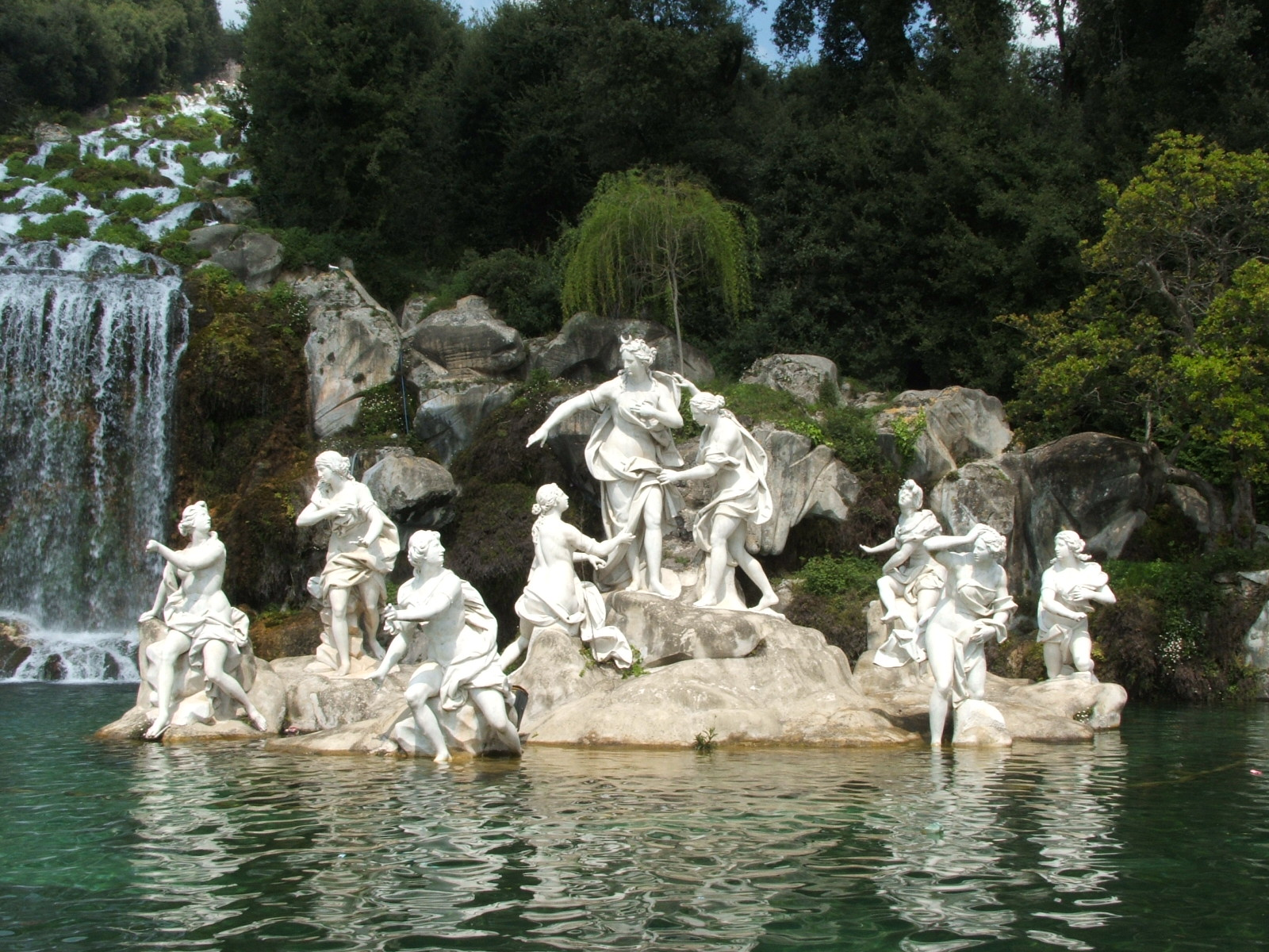 Immagine dalla Reggia di Caserta, Caserta, Campania, Italia. Statue e fontane nel parco